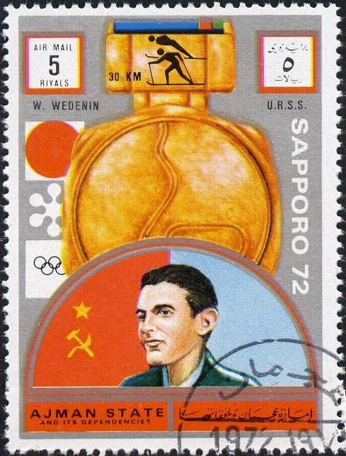 Vyacheslav Vedenin